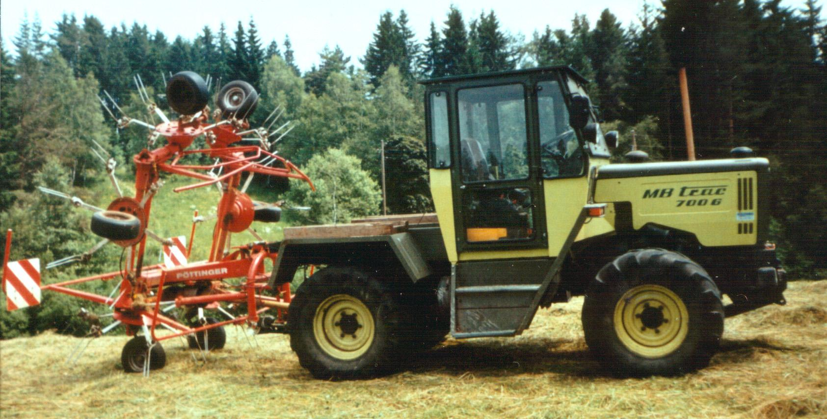 MB Trac 700 (Grünland) mit Pöttinger-Heuwender (Kreiselheuer)